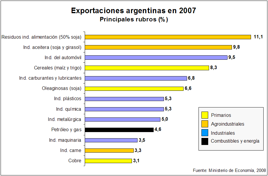 Argentina. 2007. Principales exportaciones por rubro (más de 1000 millones de dólares). Main exports by branch (more than 1 billion dollars)